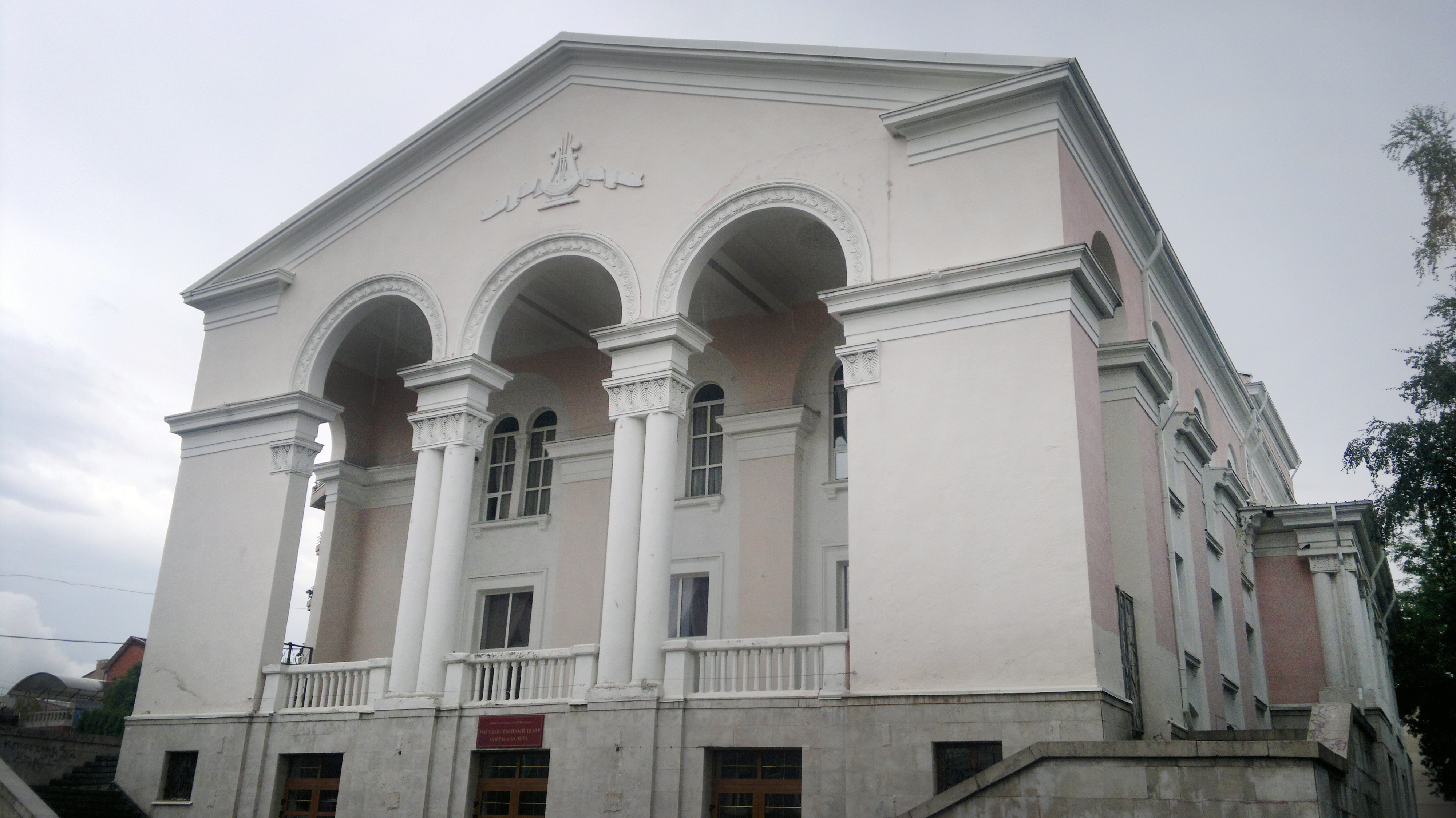 Государственный театр оперы и балета РСО-Алания